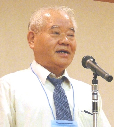 永井恒司20090725